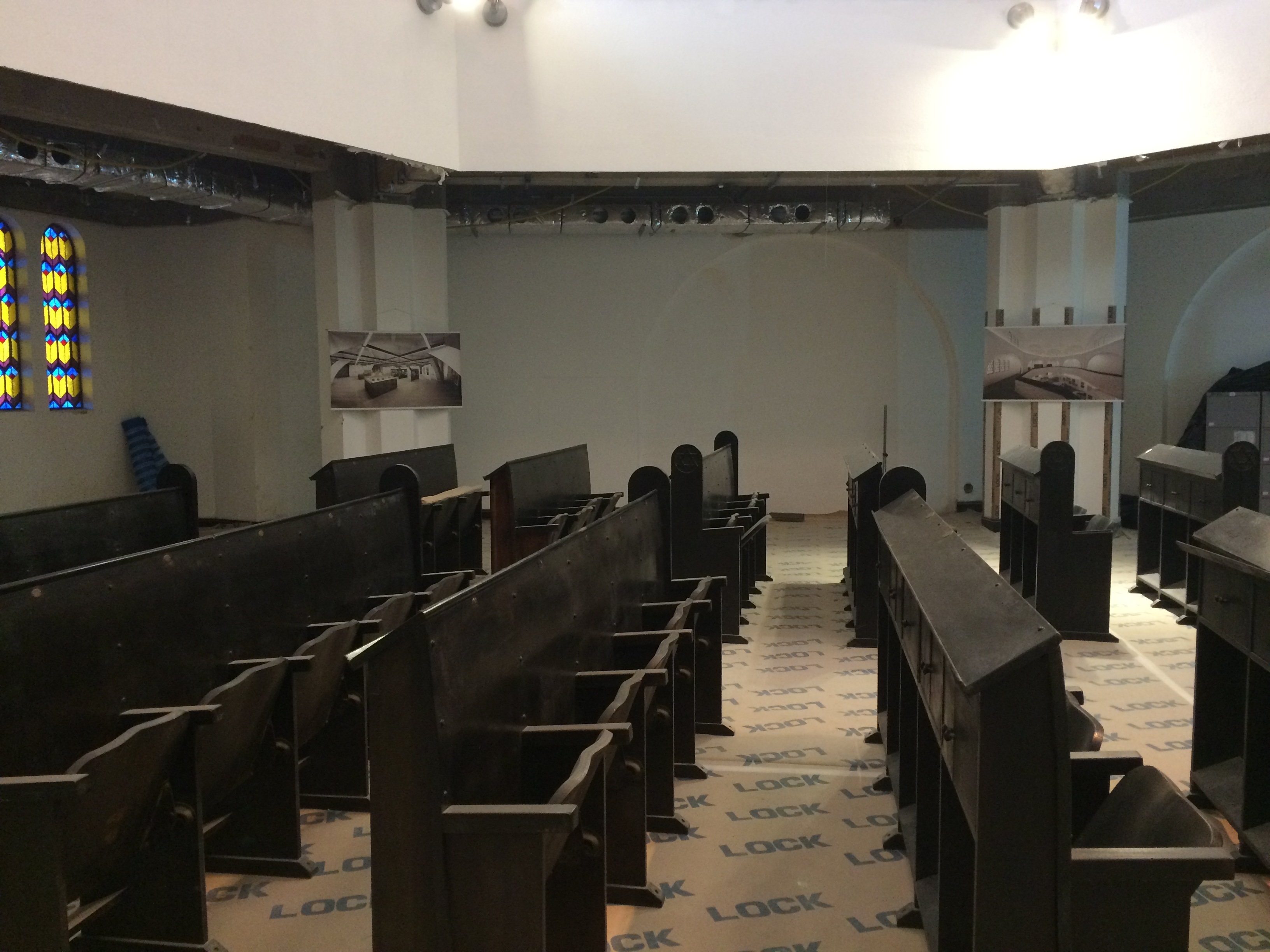 Salão Principal do Museu Judaico de São Paulo em obras, São Paulo (SP), Brasil